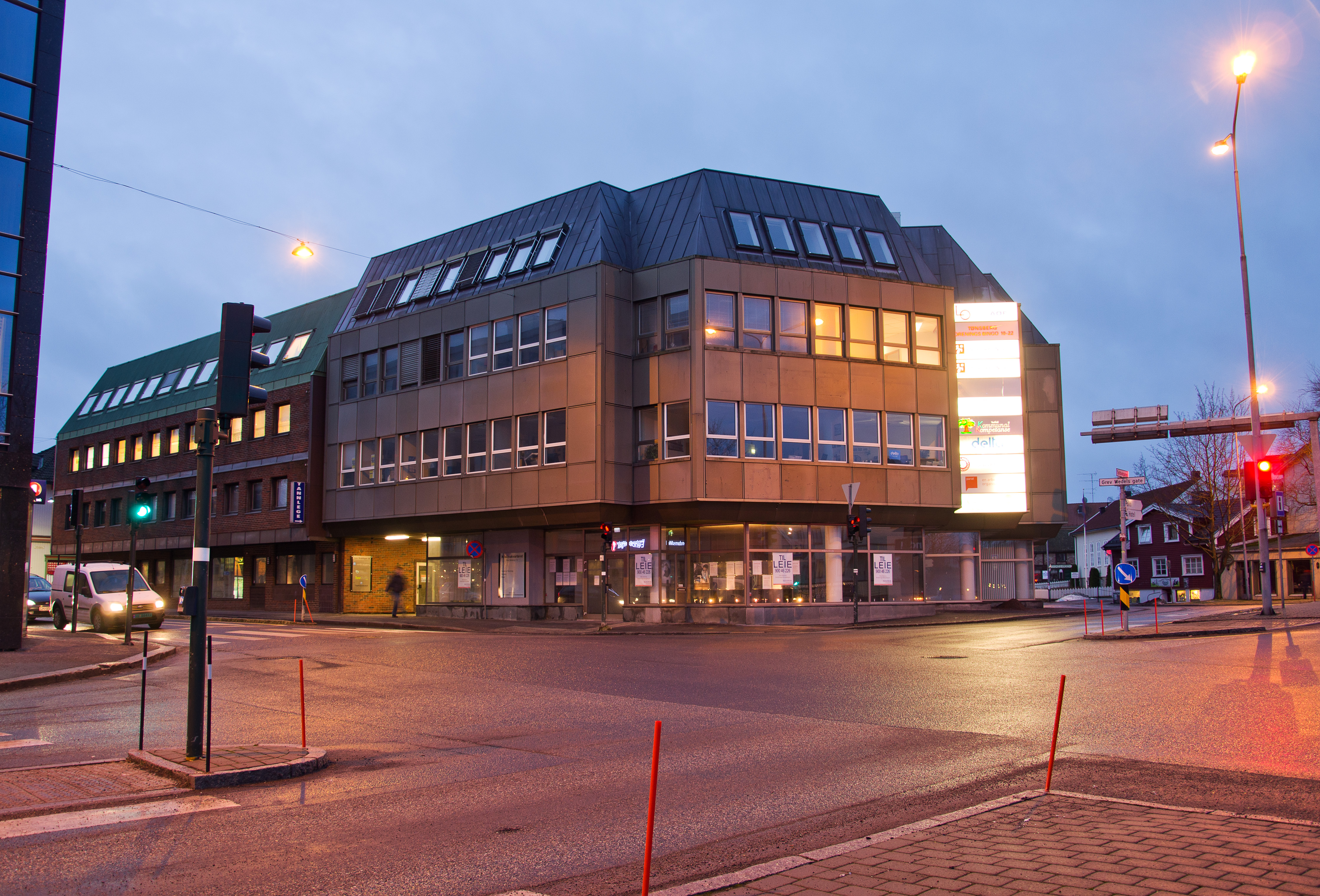 Kristinakvarteret / Kristinakvartalet. Grev Wedels gate 10 og 12, Farmannsveien 3 Byggeår 1983